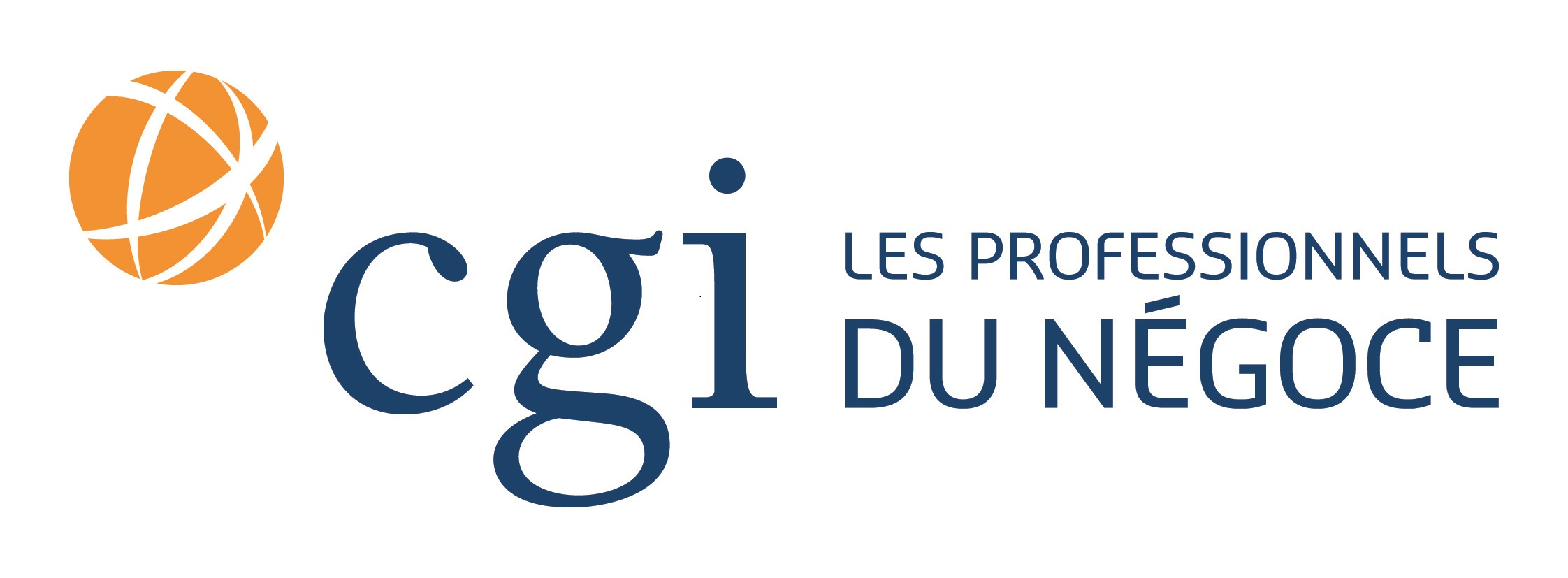 logo CGI